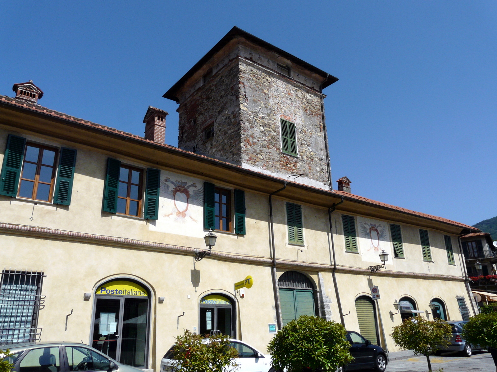 Palazzo Fieschi, Casella, Liguria, Italia